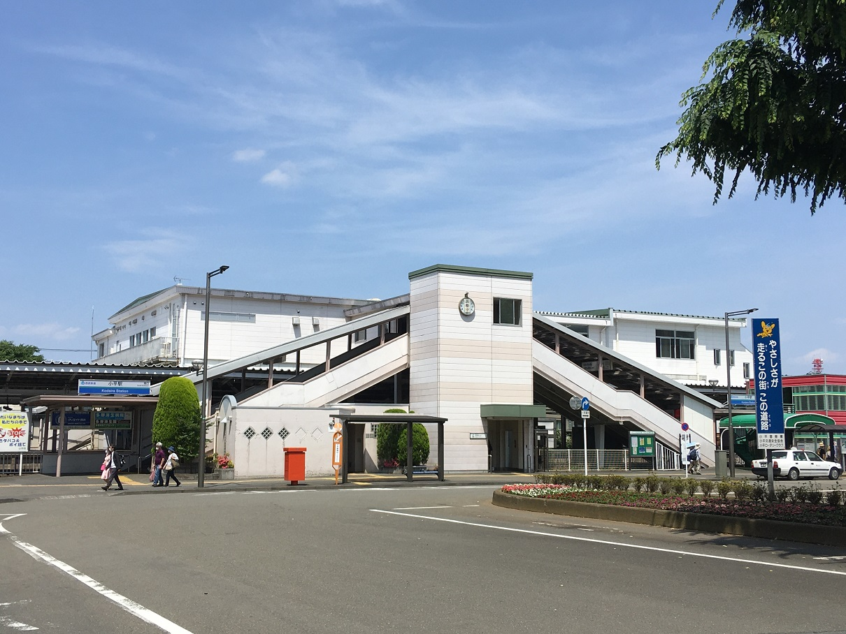 小平駅南口